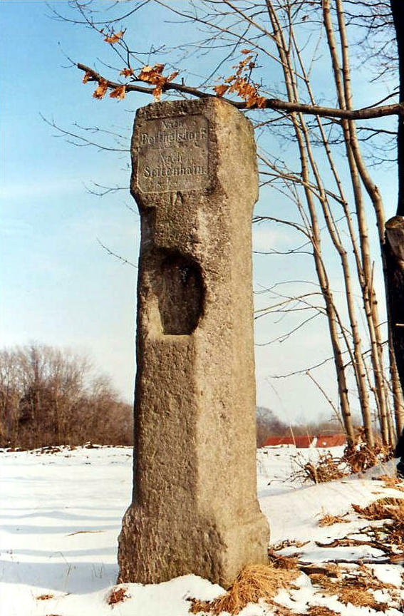 Liebstadt: sogenannte Martersäule an einem ehemaligen Pilgerweg, der auf dem Höhenrücken zwischen Müglitz und Seidewitz von Sachsen ins nordböhmische Kloster Mariaschein nahe Graupen (Krupka) führte